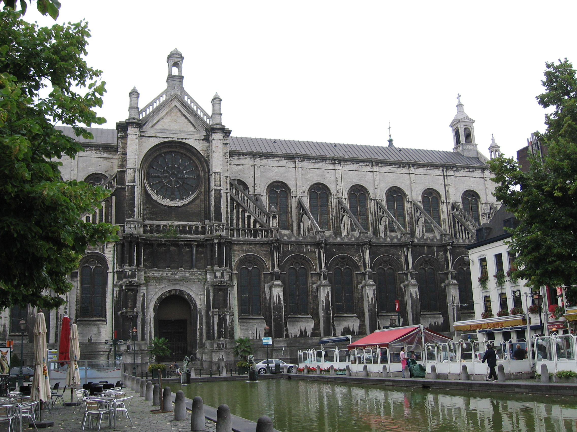 Eglise Sainte-Catherine, à Bruxelles (Belgique). Oeuvre de l'architecte Joseph Poelaert.